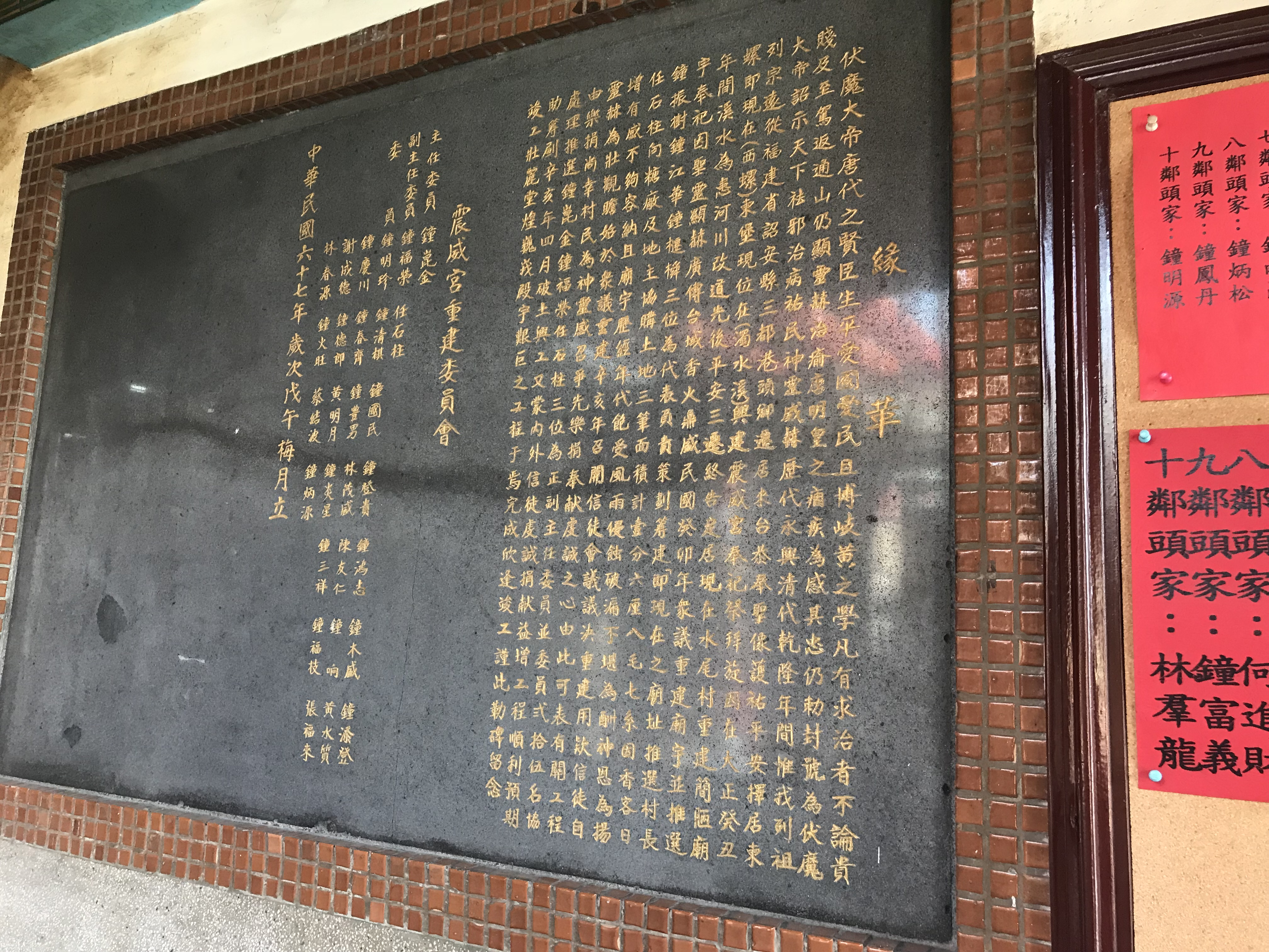 中文（台灣）: 水尾震威宮緣革